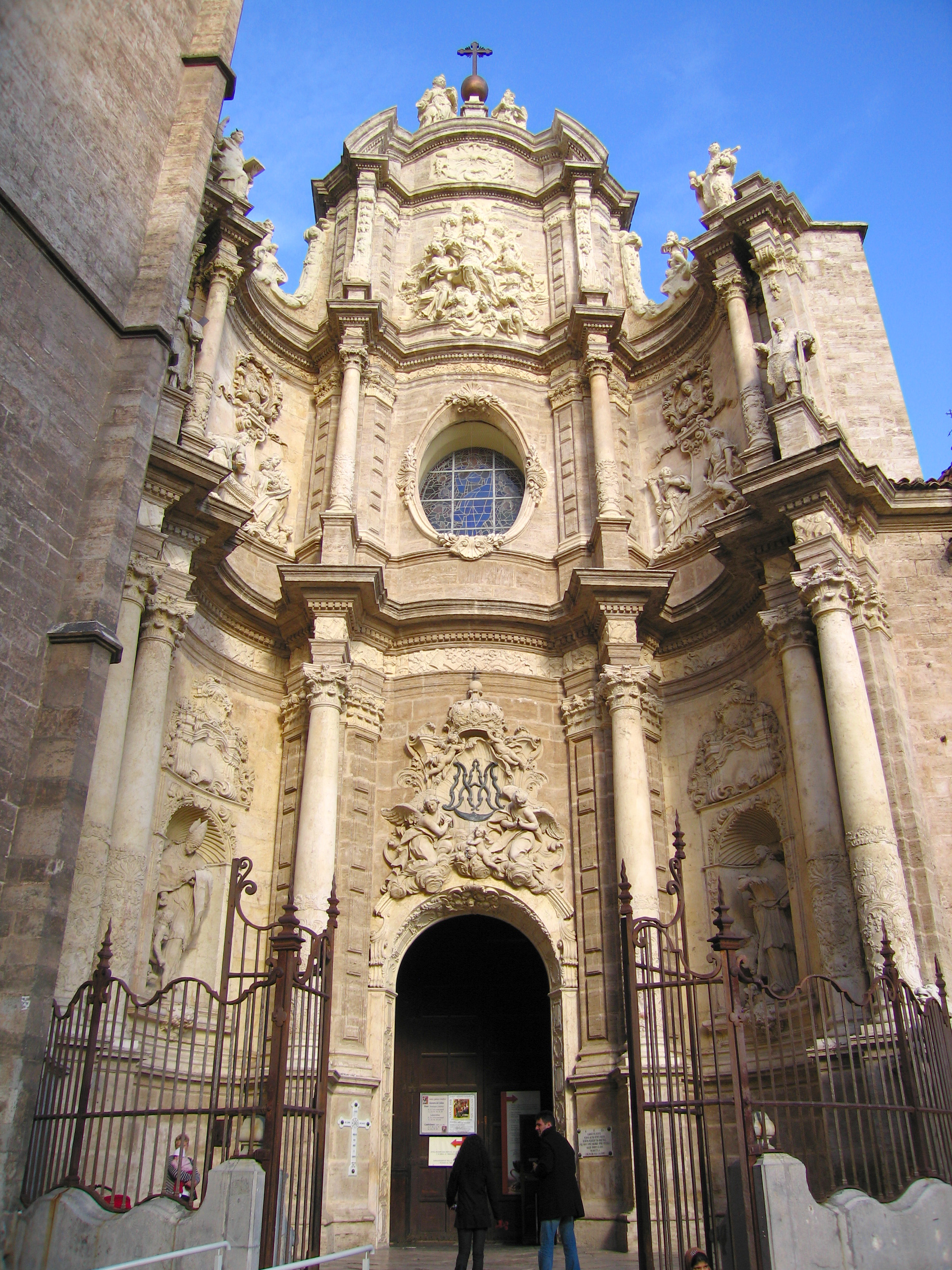 Porta Ferros Seu de València